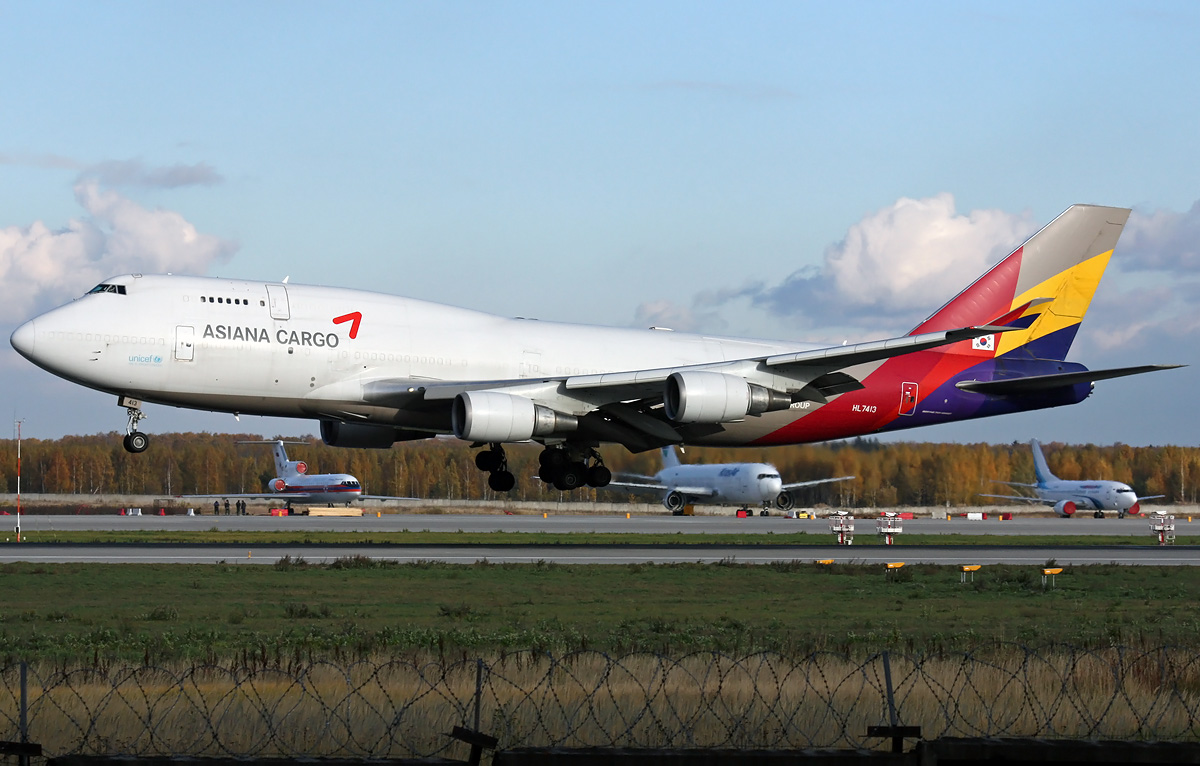 Boeing-747